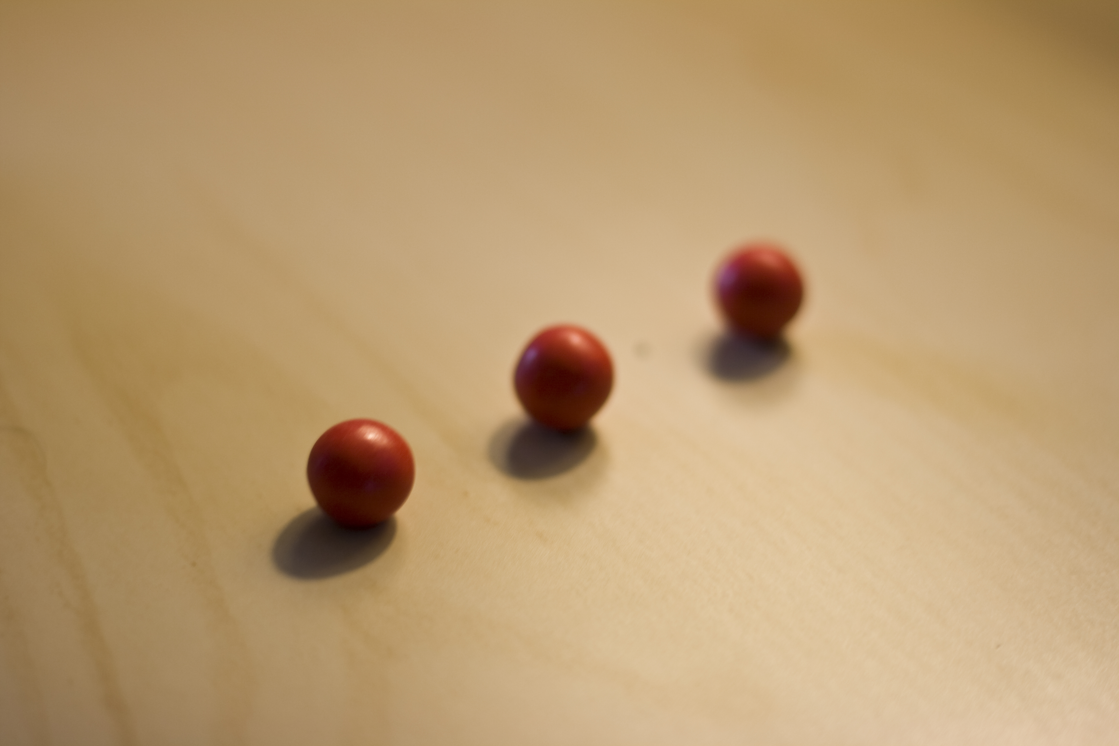 Jaffas